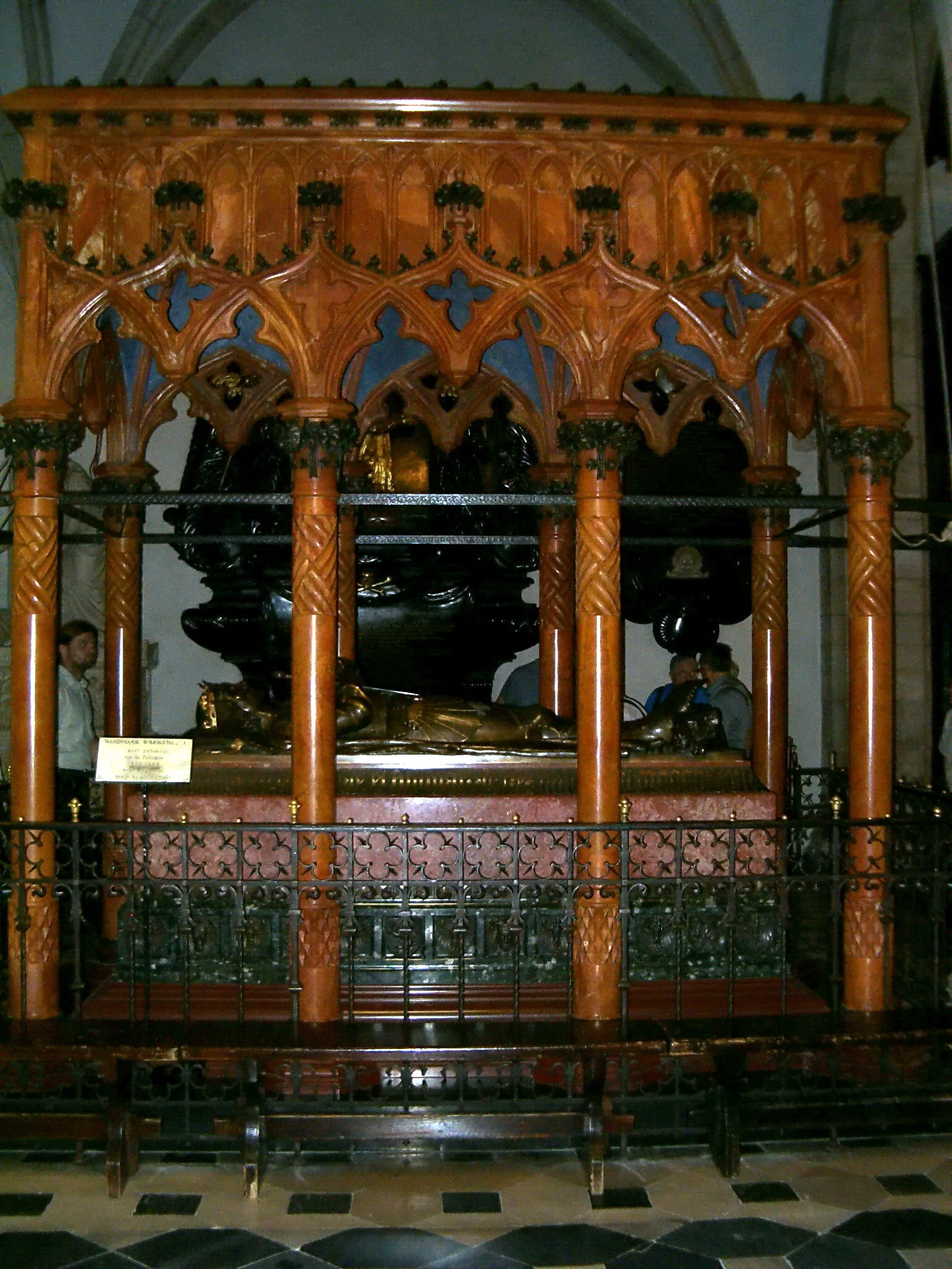 Symboliczny nagrobek Władysława III Warneńczyka w Królewskiej Katedrze na Wawelu